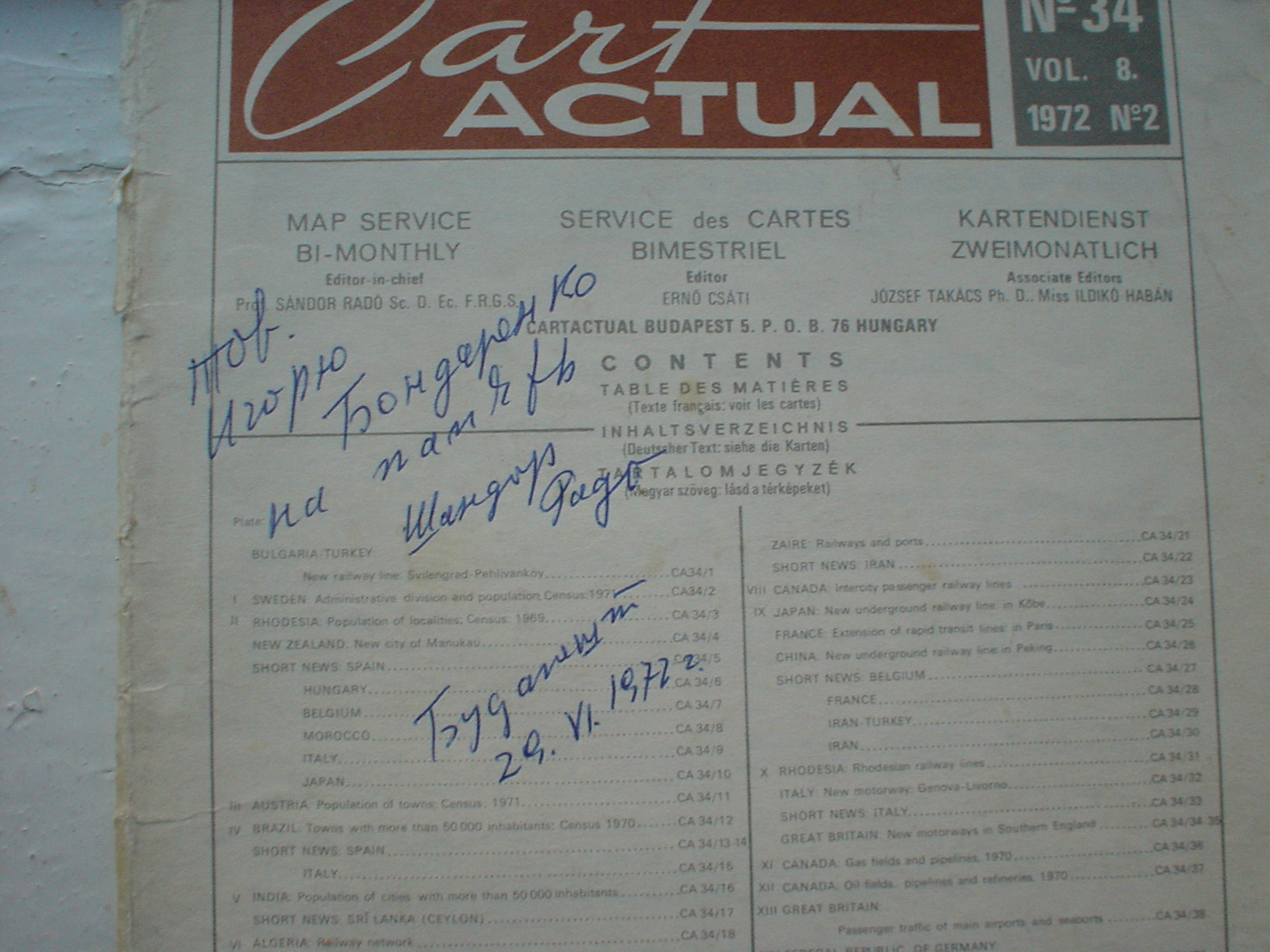 Автограф Шандора Радо, данный писателю И. Бондаренко в 1972 г. во время его работы над романом "Красные пианисты"